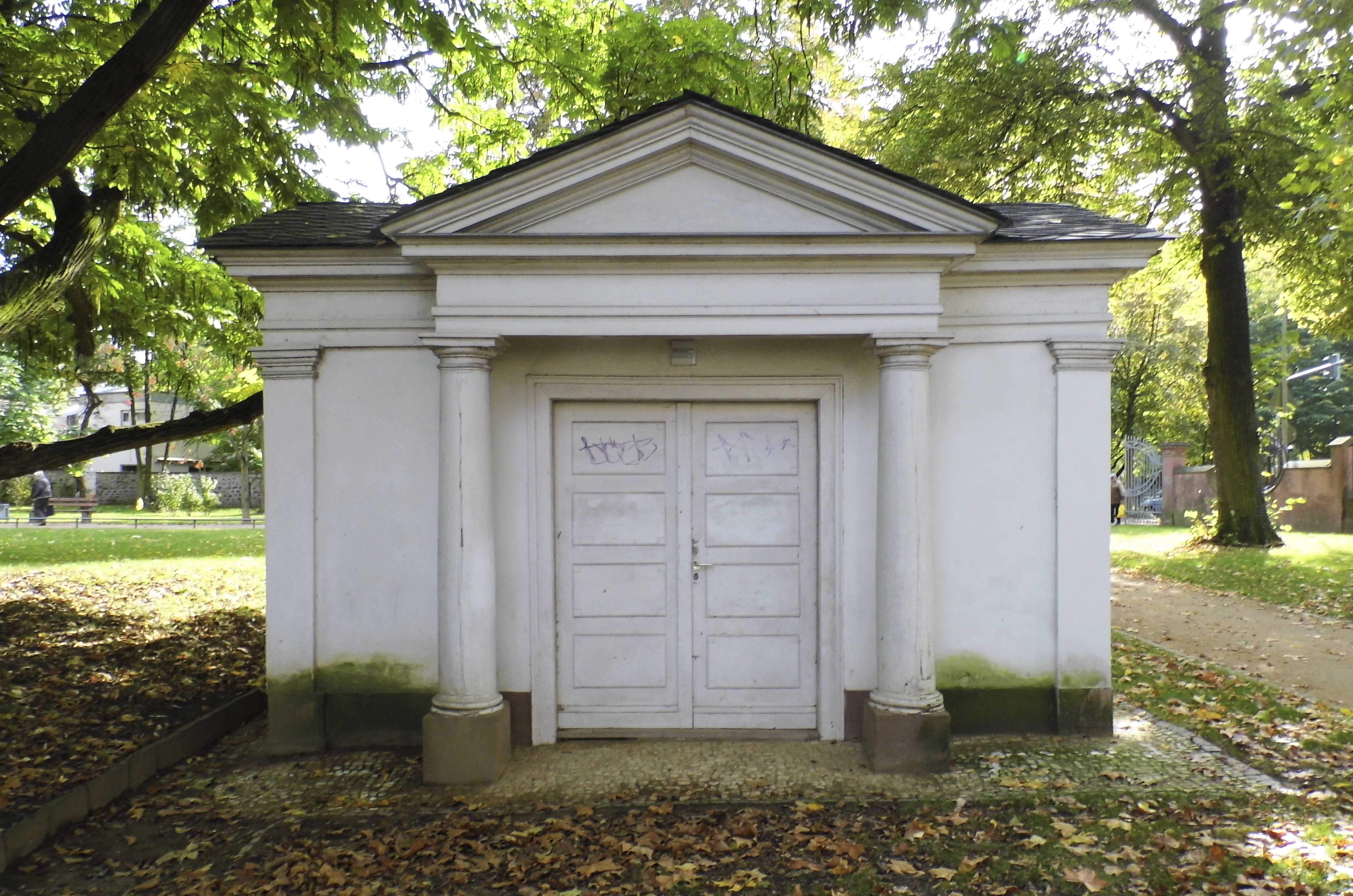 Rödelheim, Brentanopark, Goethe-Tempel, Front